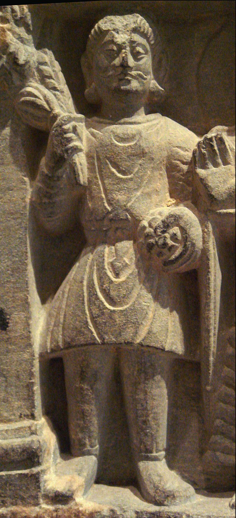 Kushan Devotee